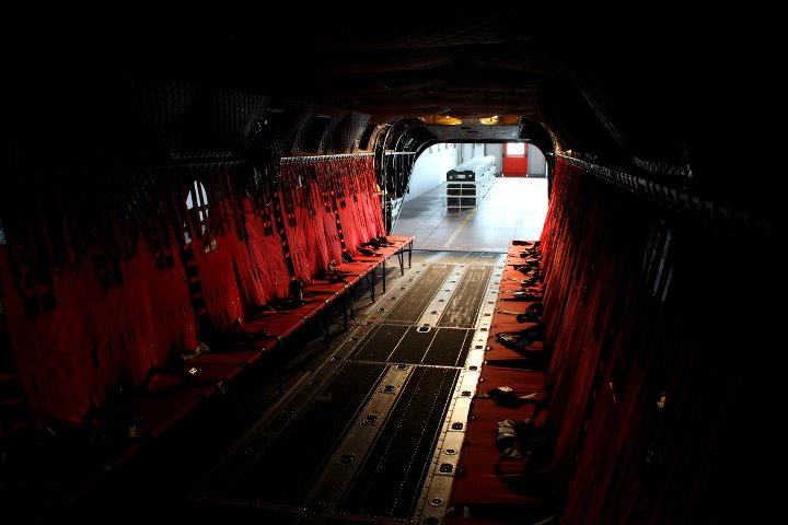 Particolare iterno Boeing CH-47 Chinook